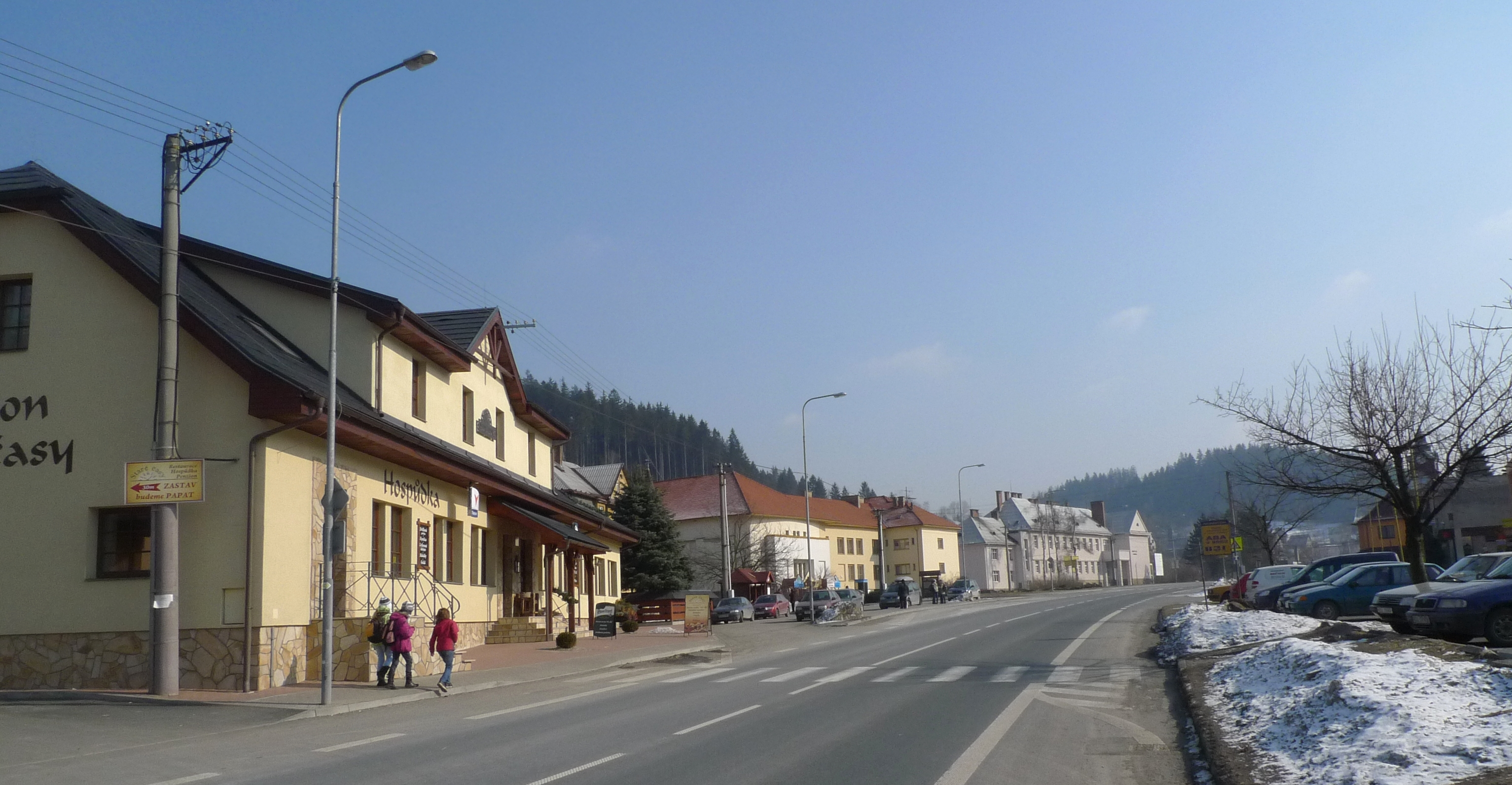 Centrum Horní Bečvy, okres Vsetín